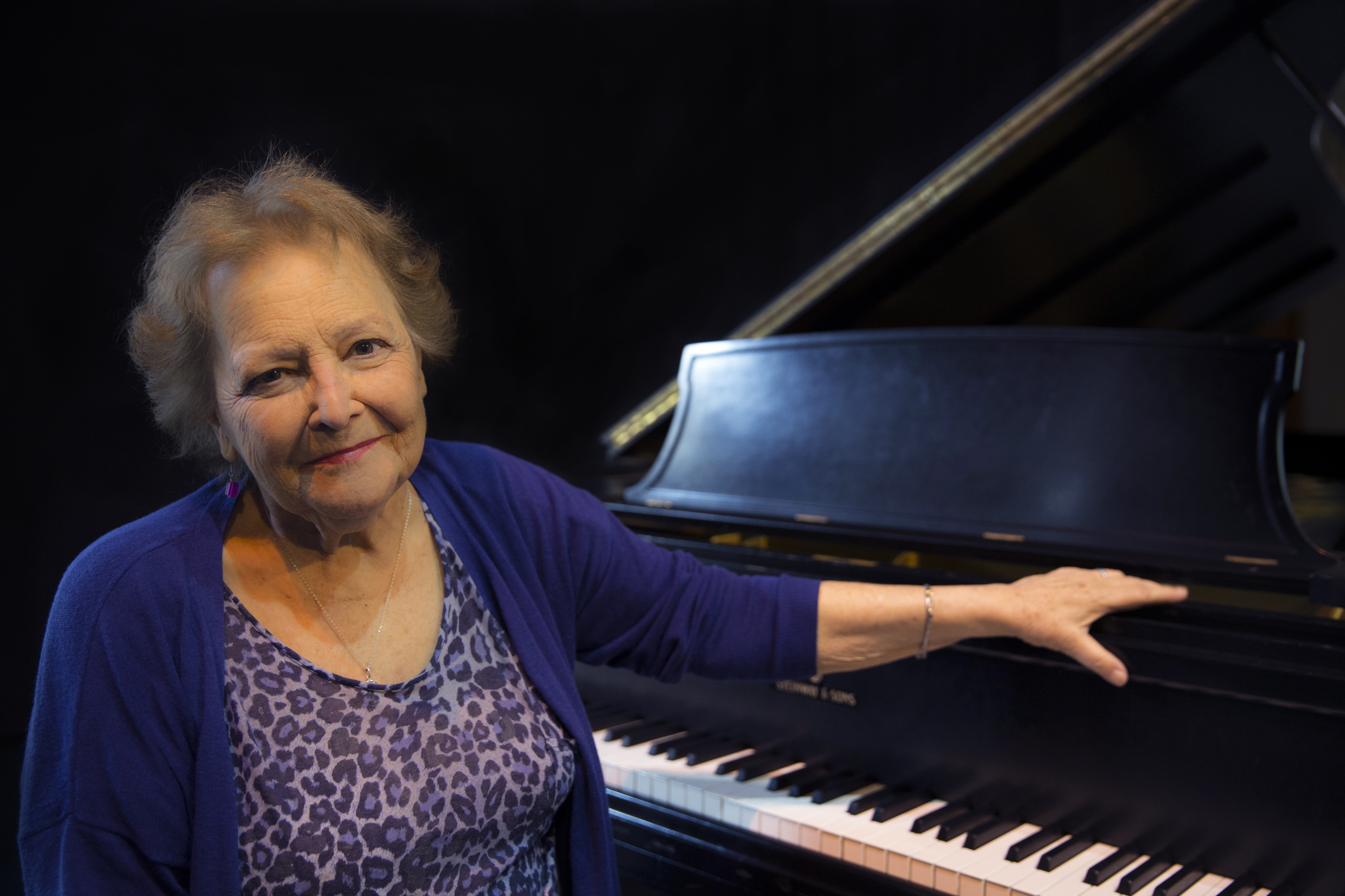 Hilda Herrera, compositora y pianista argentina, en 2017.